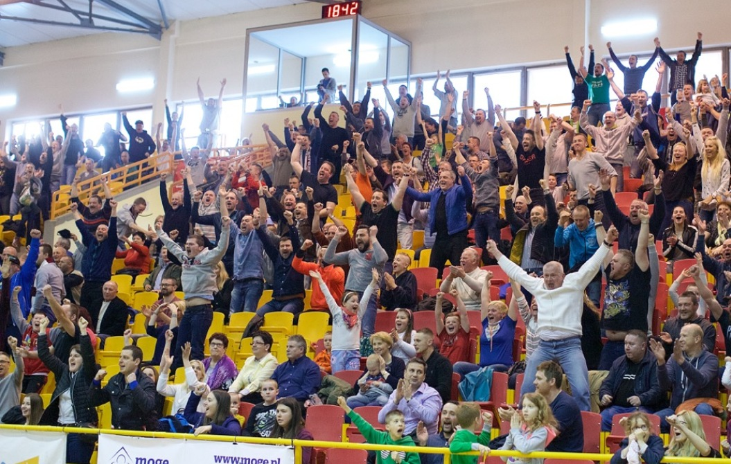 Stargard, 2017r. Kibice Spójni Stargard podczas meczu z GKS Tychy